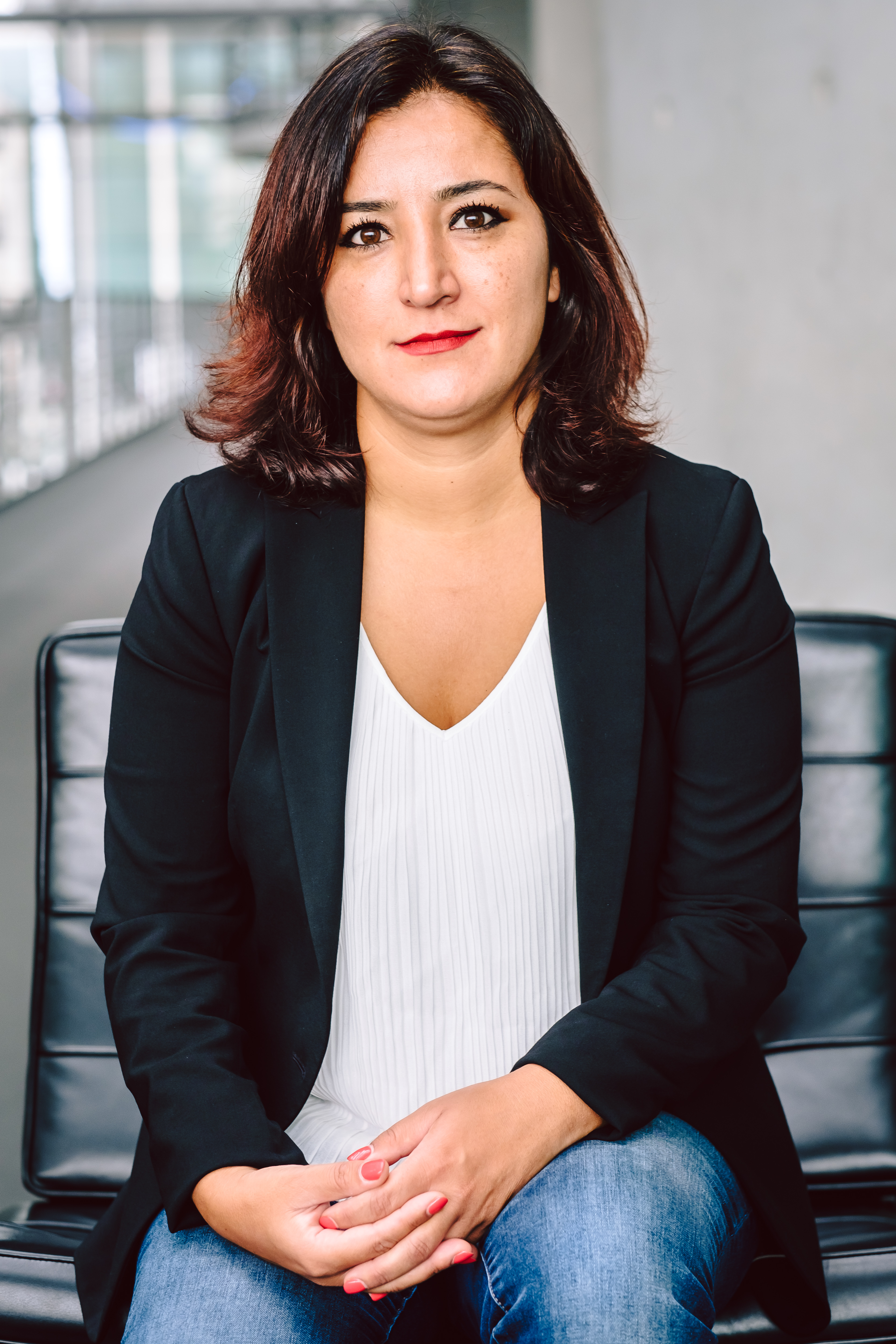 Porträt von Gökay Akbulut ++ am 20.08.2018 in Berlin (Berlin).